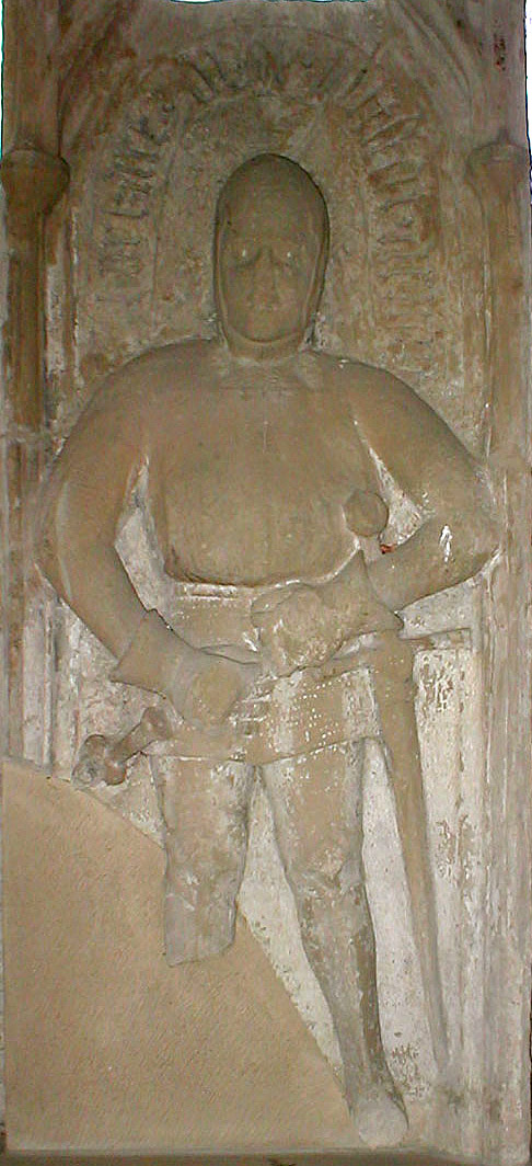 Epitaph für Burkhard von Wittstatt aus dem 15. Jhd. an der Friedhofsmauer in Bad Friedrichshall-Untergriesheim